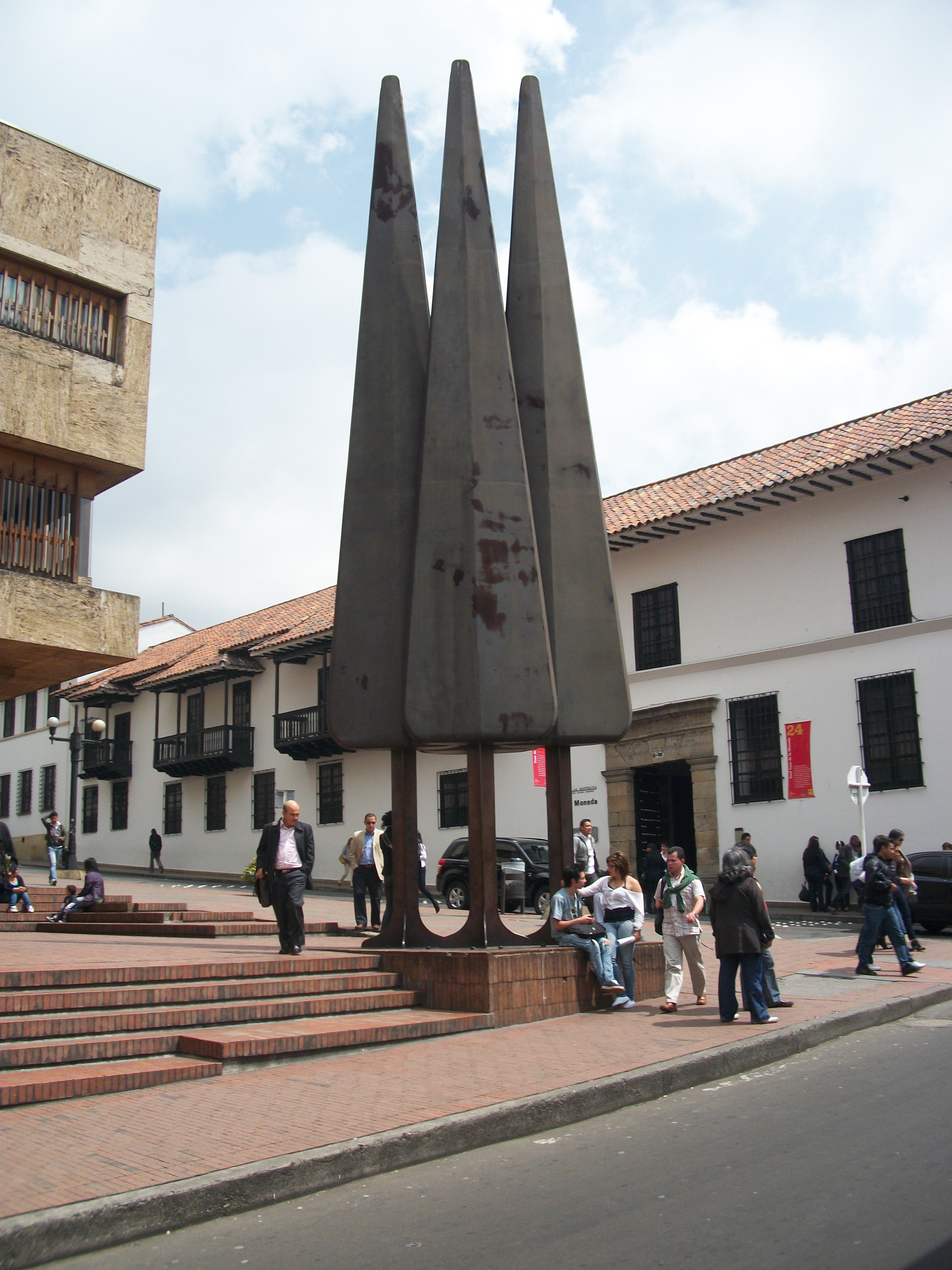 "Bosque Cultural", esquina suroccidental de la Biblioteca Luis Ángel Arango.